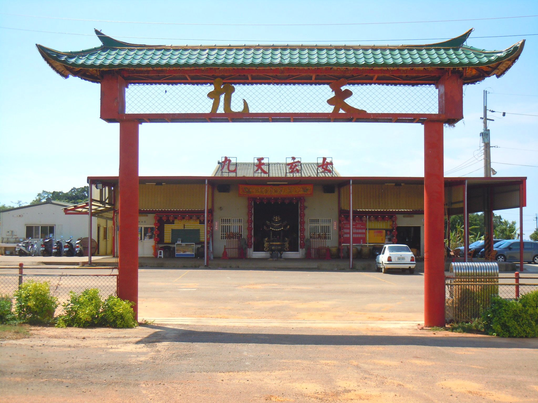 九天靈修院在臺中市大雅區清泉路90號。